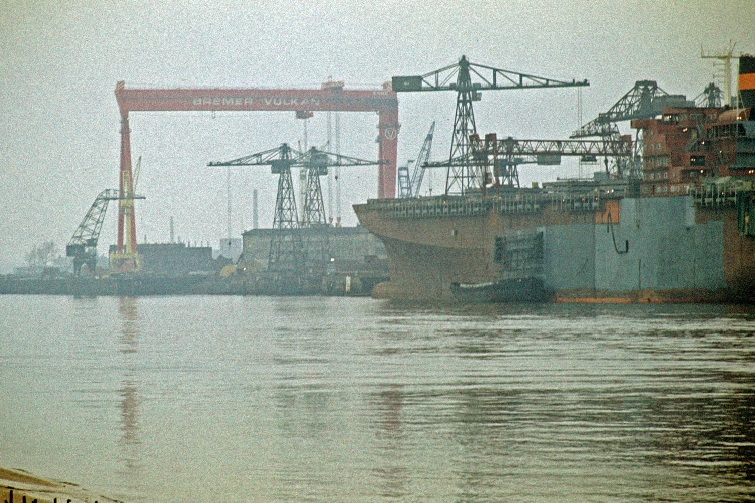 Ausrüstungspier der Bremer Vulkan Werft